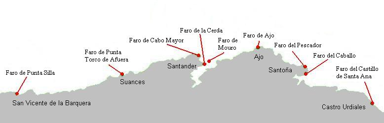 Mapa de la costa de Cantabria, indicando ubicación de los faros existentes.